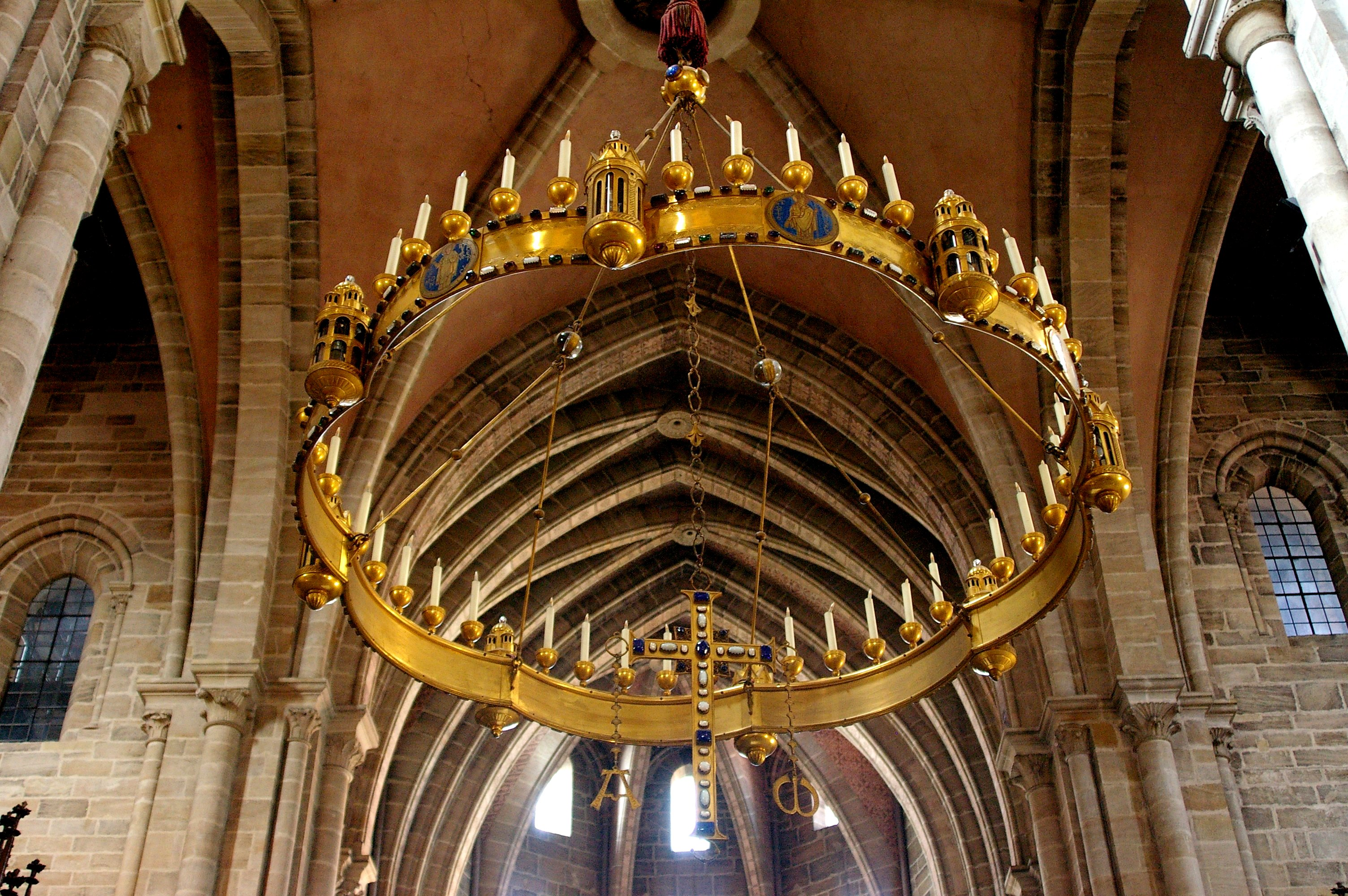 Bamberger Dom - Radleuchter